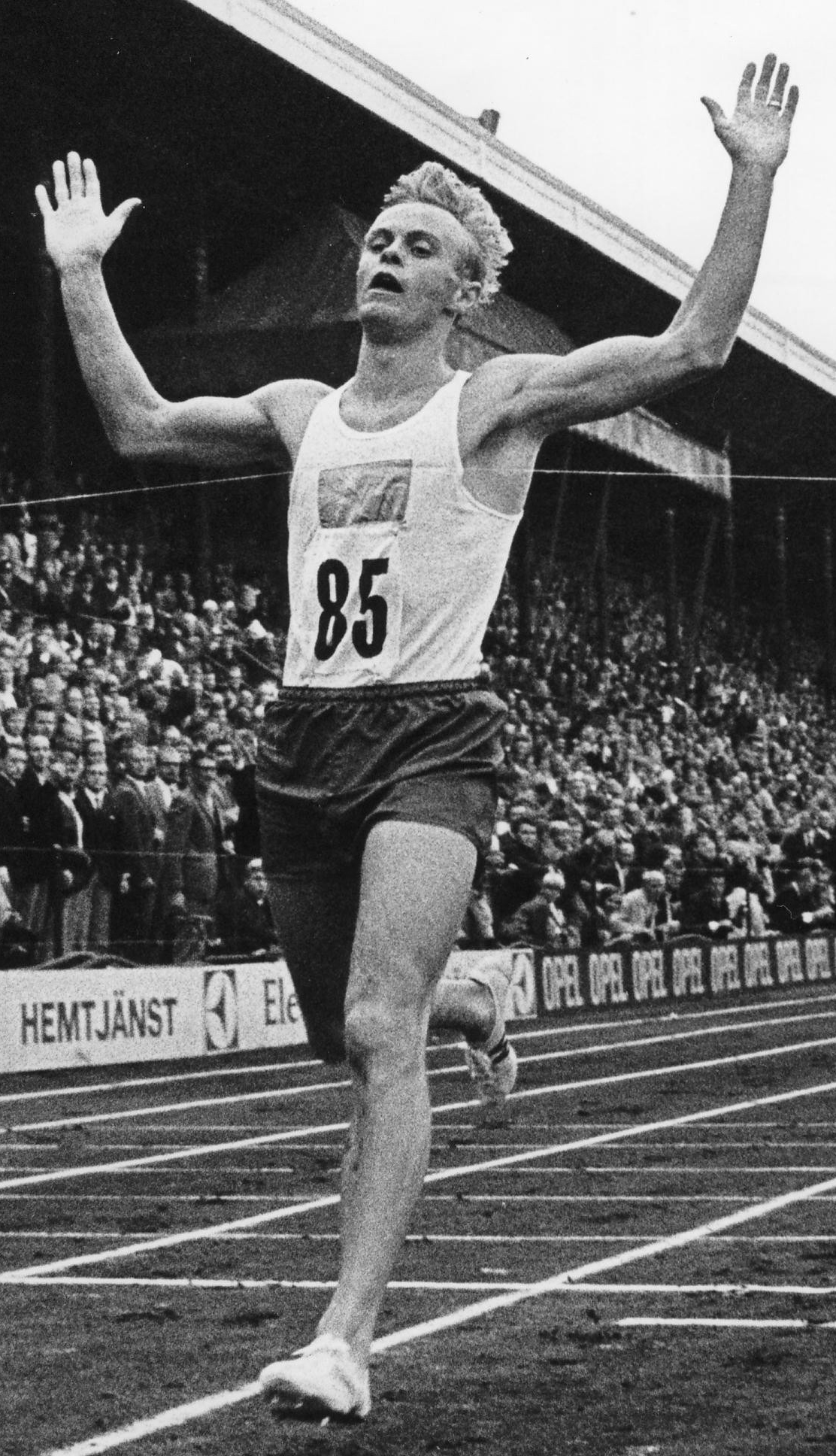 Ove Berg